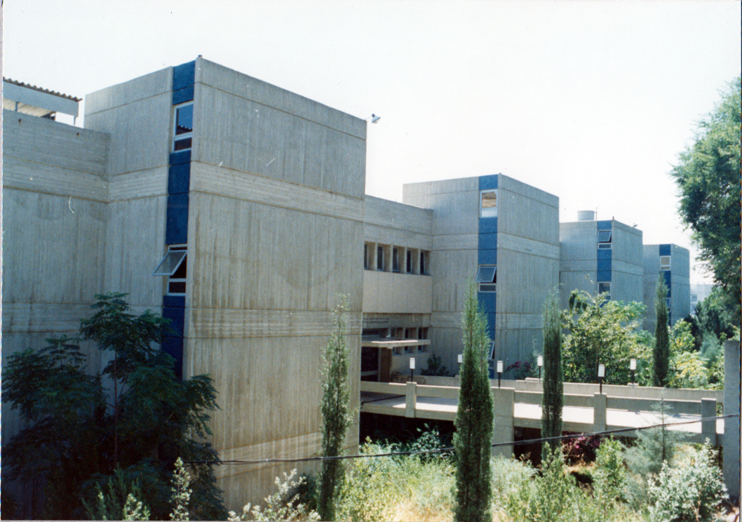 הפקולטה למזון בטכניון חיפה